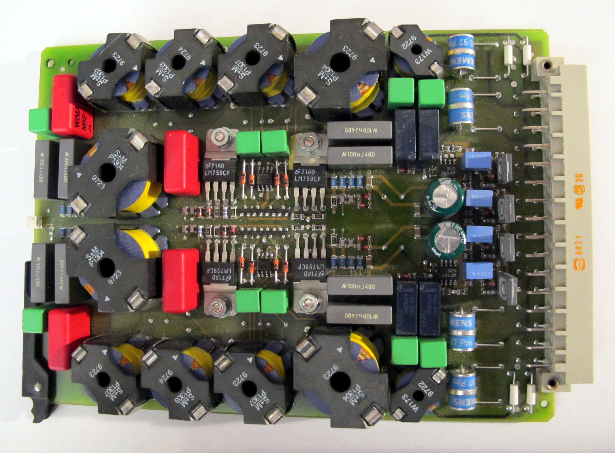 Bestückte Europakarte mit 100mm × 160mm. Rechts VG-Leiste (nach DIN41612)